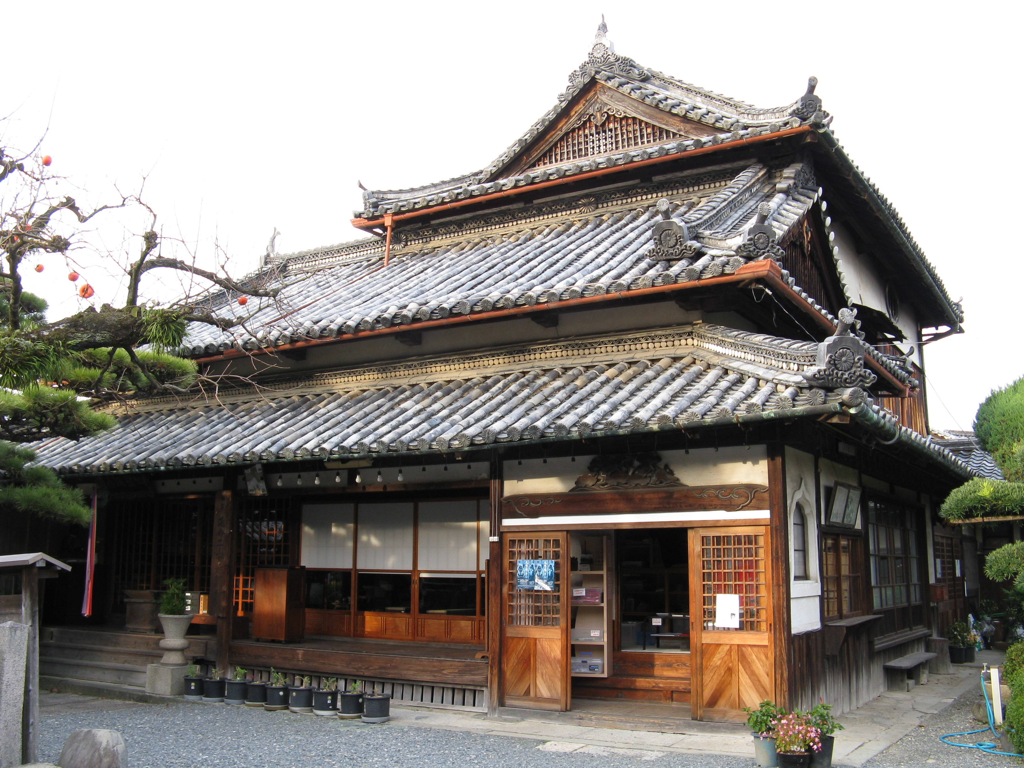 善名称院 本堂